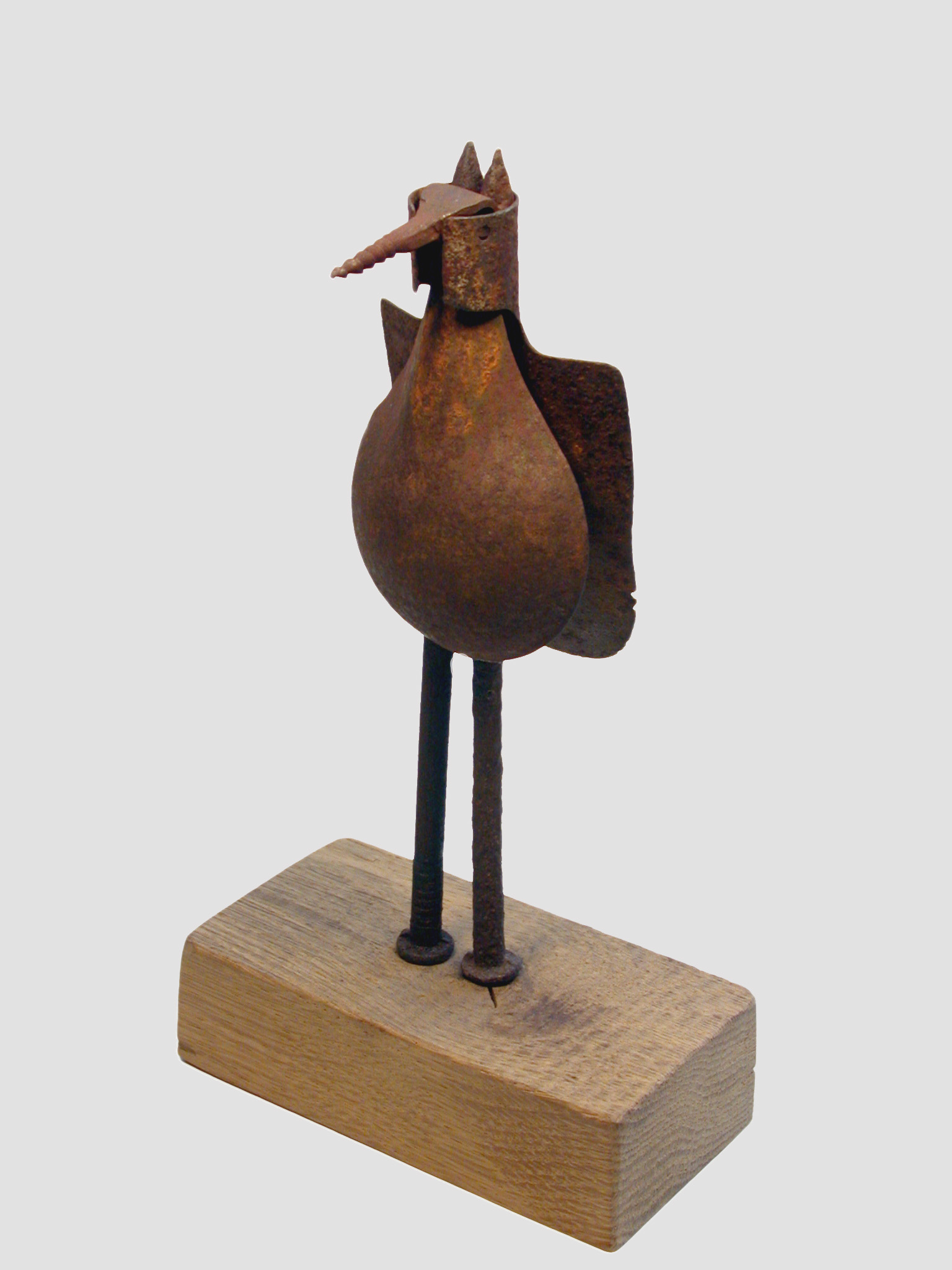 Object trouvé von Josef Caminada